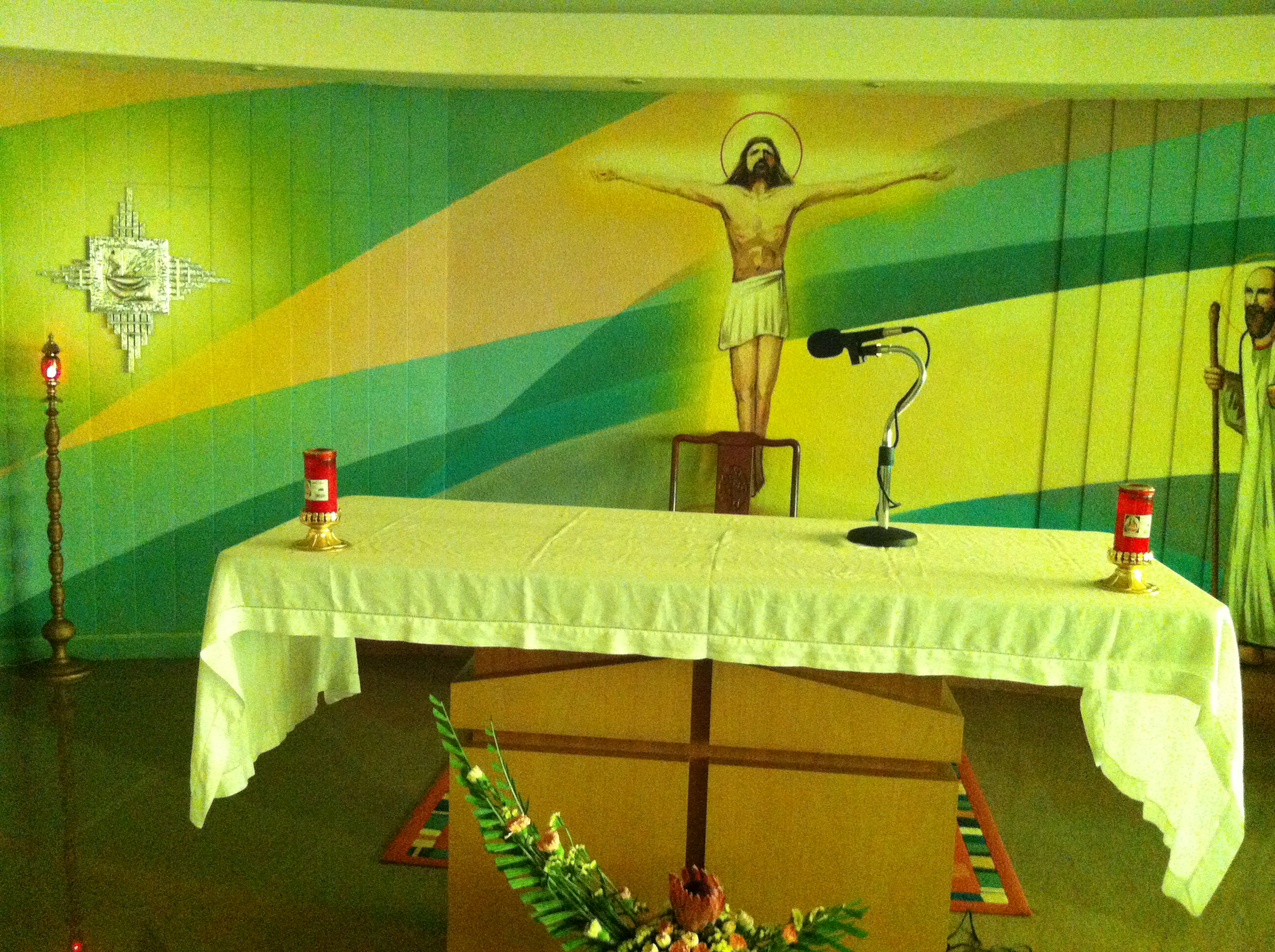 中文（香港）: 聖保祿彌撒中心, 香港, 中國